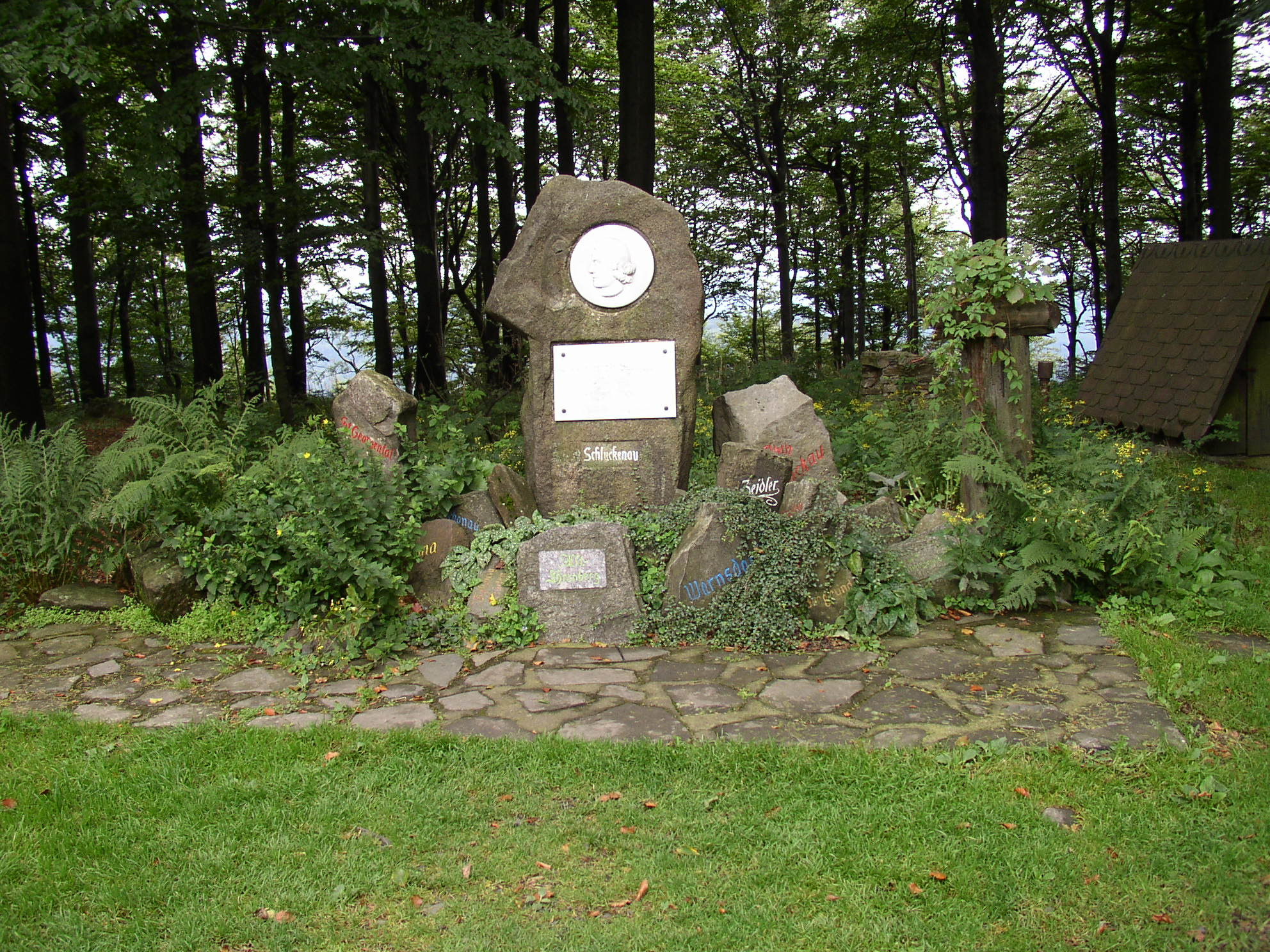 Schillerův pomník na vrcholu Jedlové